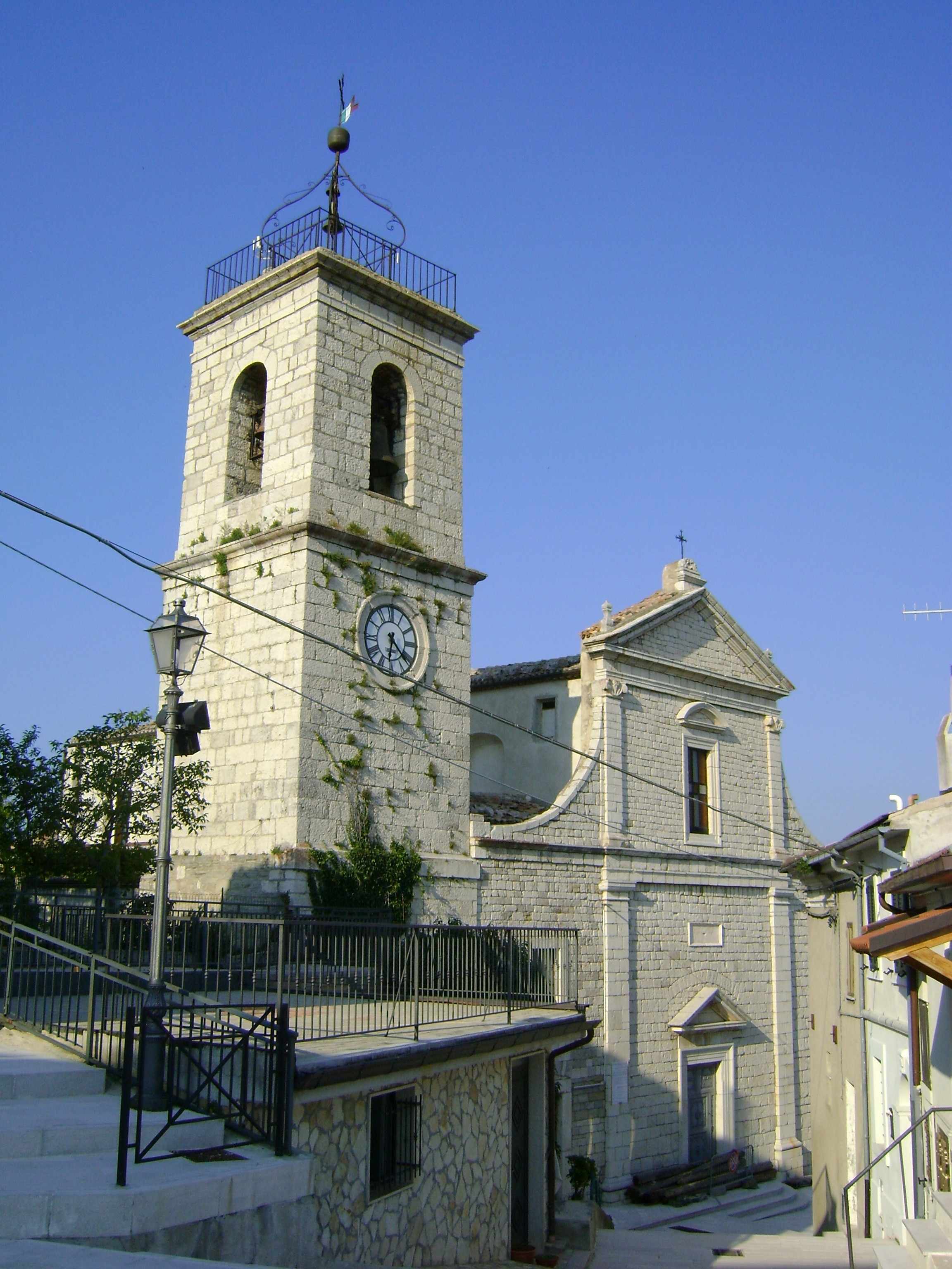 Chiesa di San Giacomo Maggiore. Torricella Peligna, Chieti.